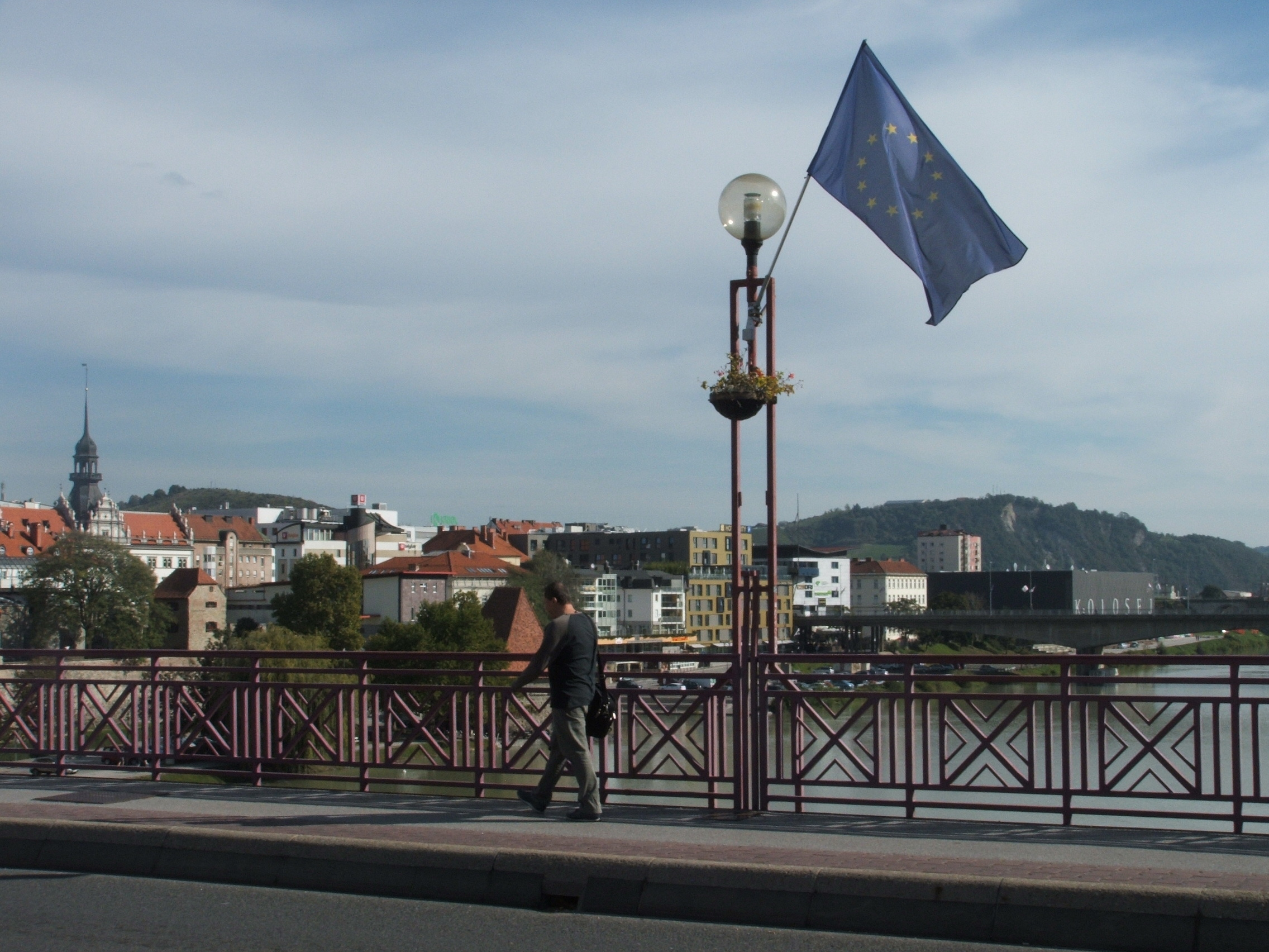 Maribor